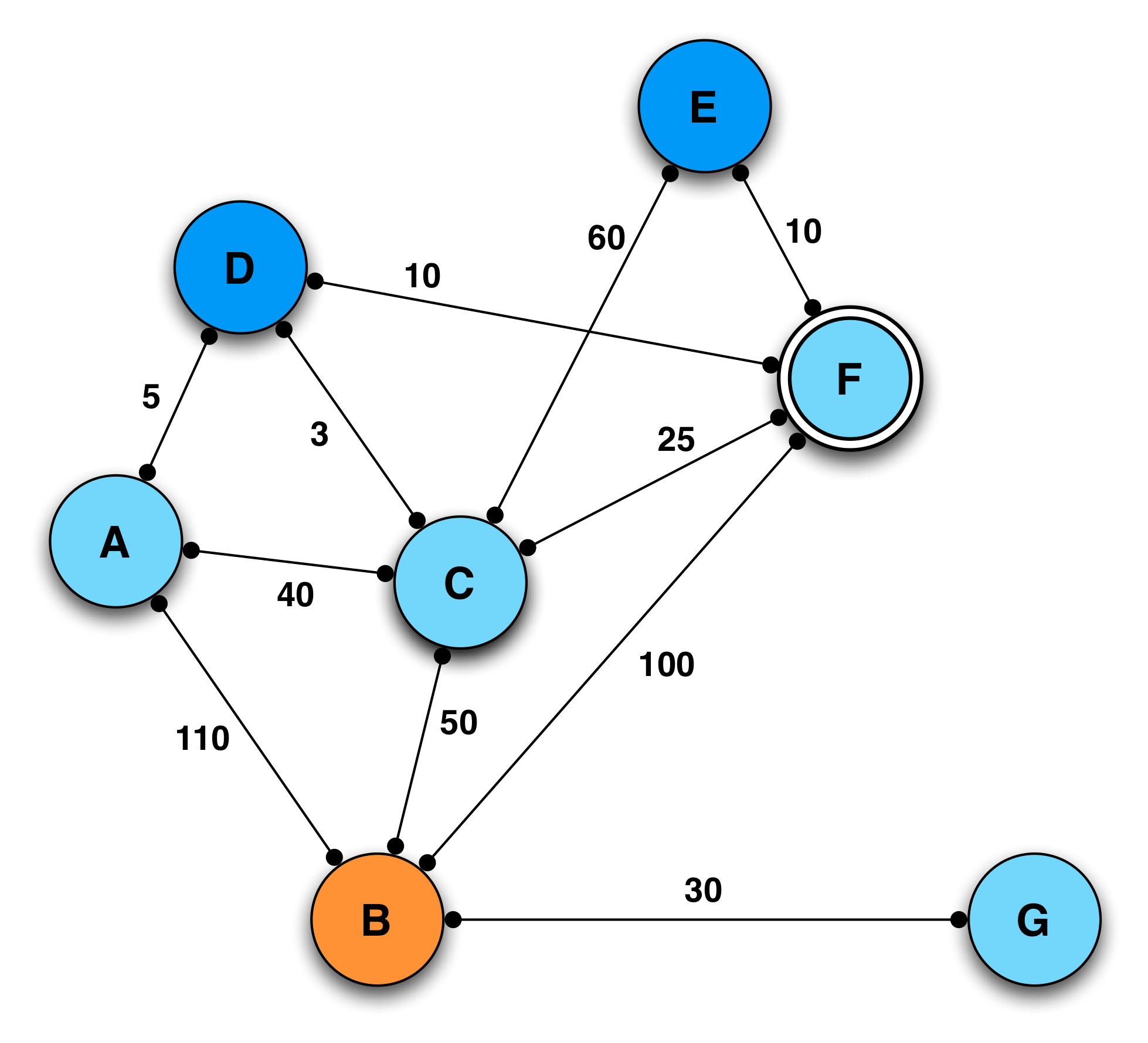 QoS - Algo OLSR modifié, version 1